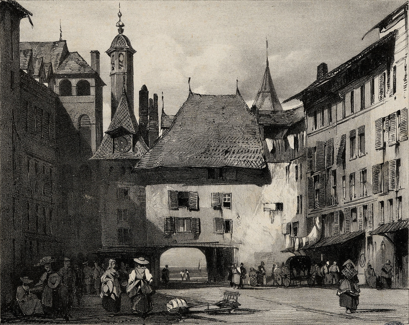 Place du Molard à Genève, bas de la place avec vue en direction du lac. Tour du Molard. Recadré à la taille de l'image.